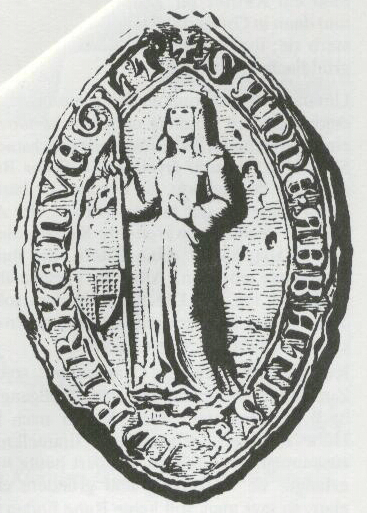 Siegel der Himmelkroner Äbtissin Anna von Nürnberg (aus dem Haus der fränkischen Hohenzollern)